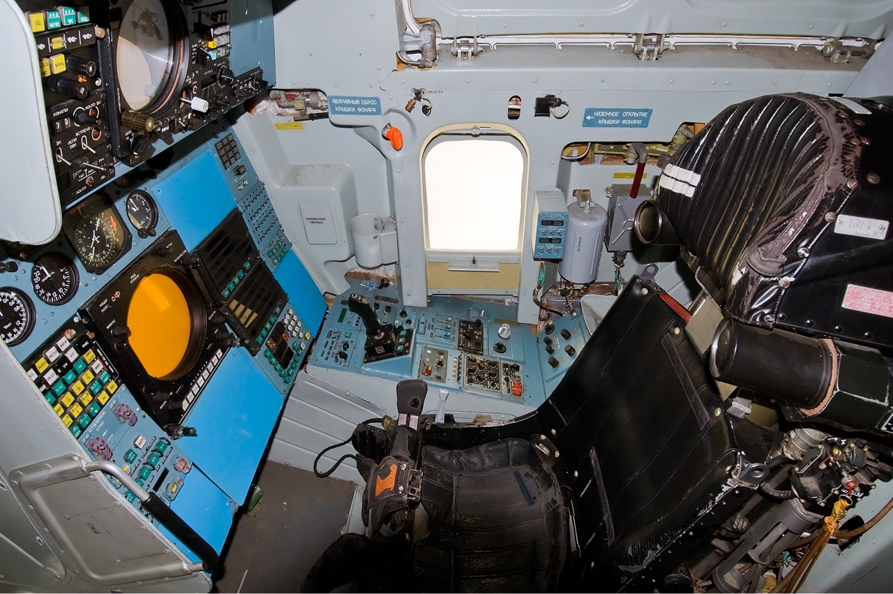 Tupolev Tu-160